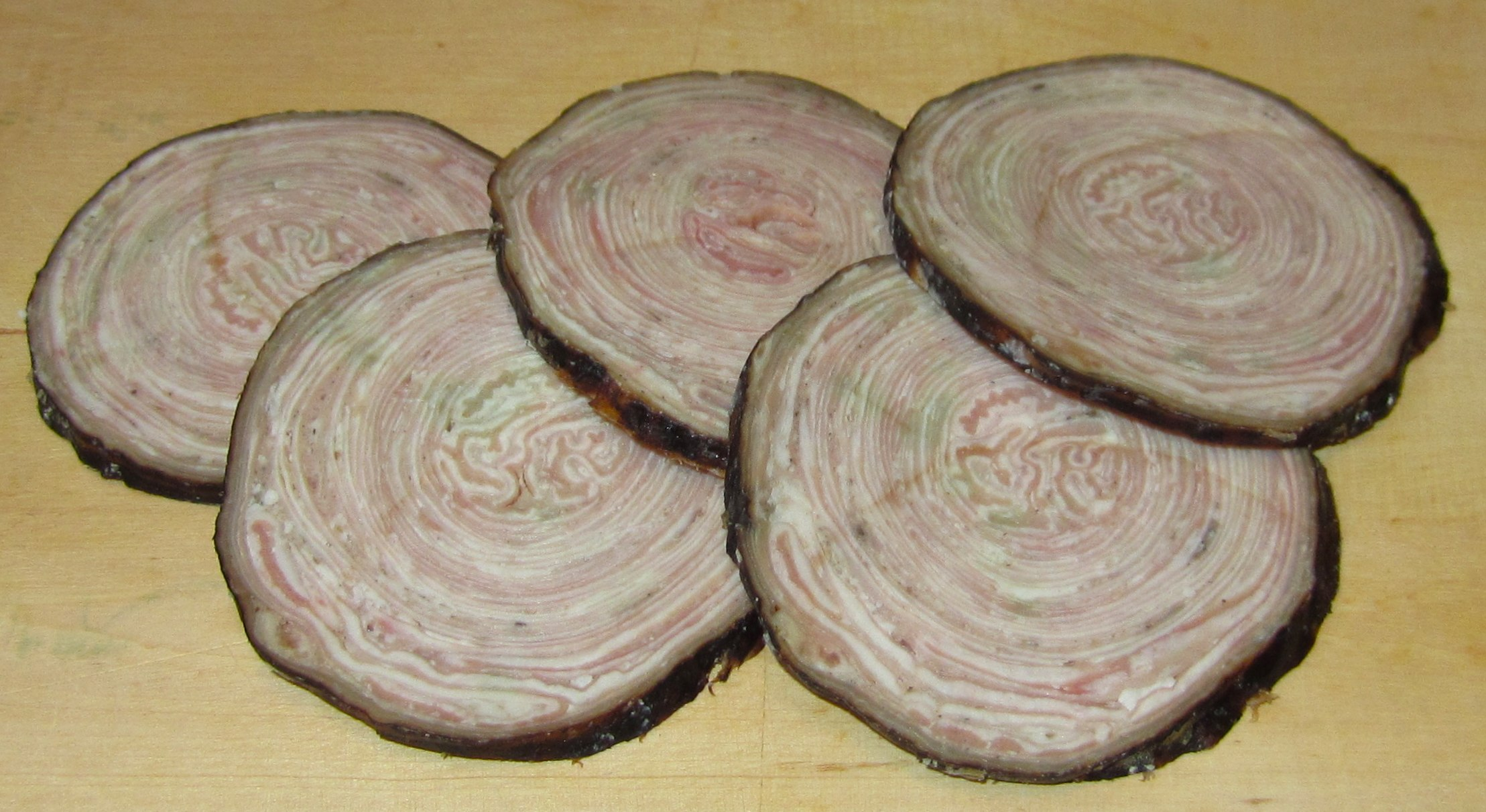 Französische Innereienwurst